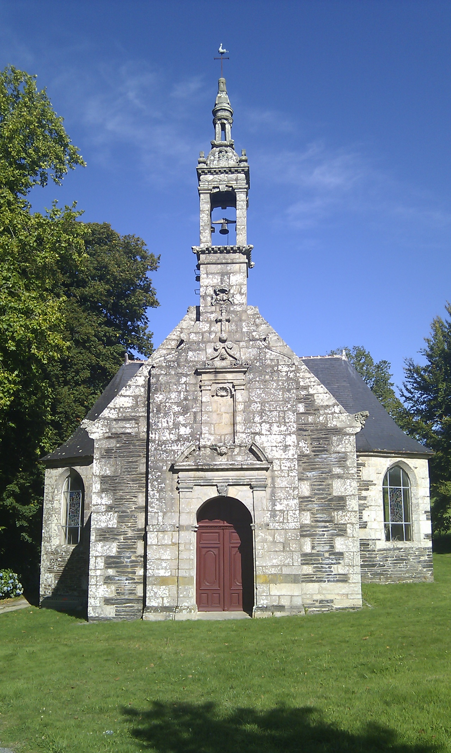 La chapelle Saint-Hubert du domaine de Trévarez